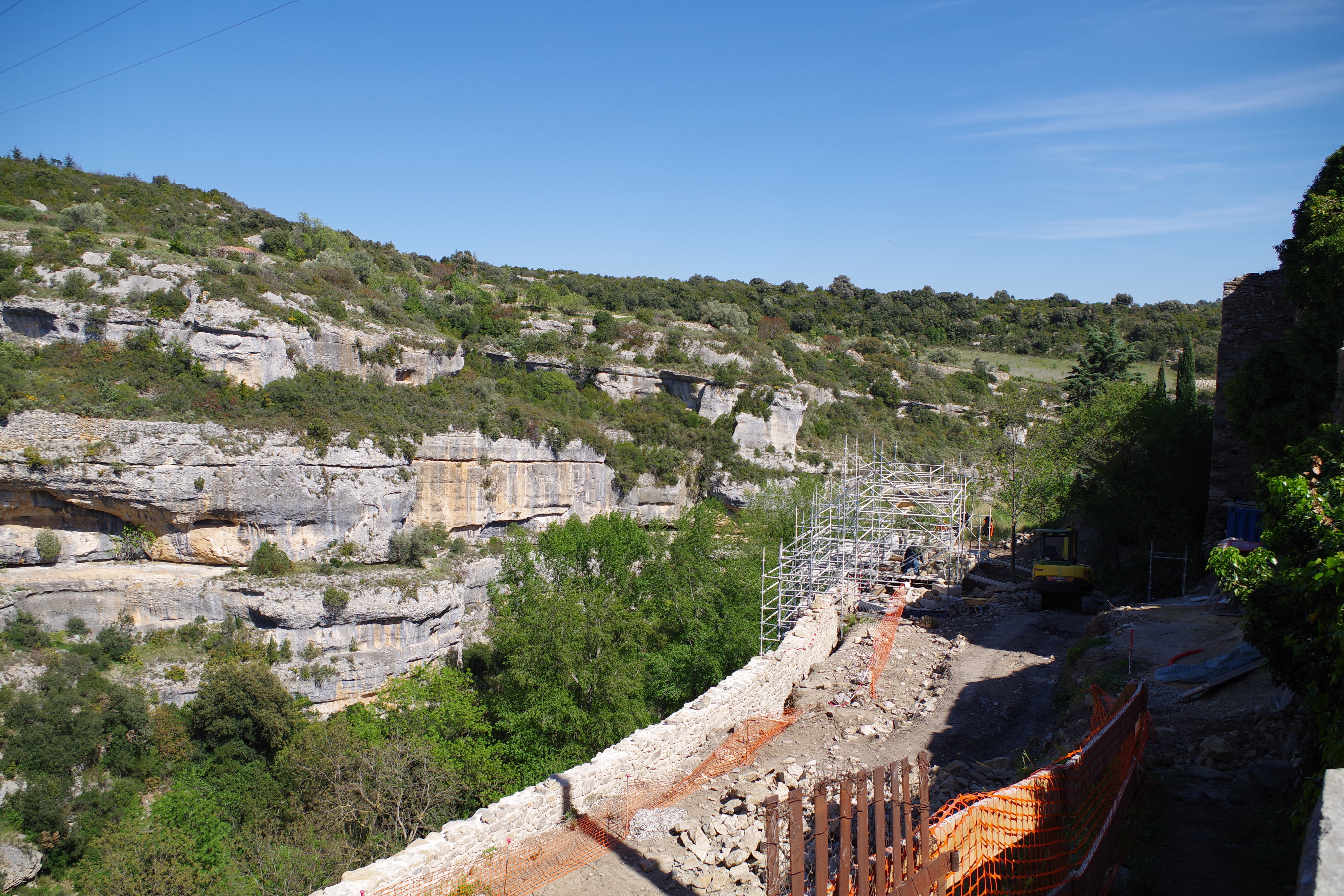 Restauration de la muraille de la citadelle de Minerve, en avril 2016 (parcelles cadastrales B 807 et 808)